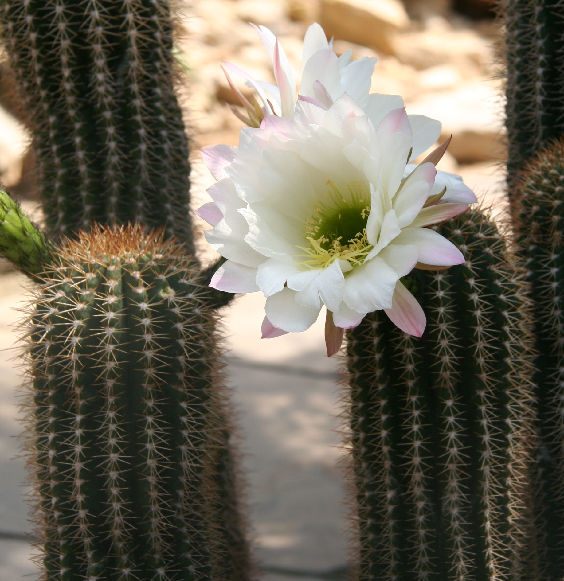 Echinopsis schickendantzii - syn: Soehrensia schickendantzii, Echinopsis smrziana im Botanischen Garten Dresden